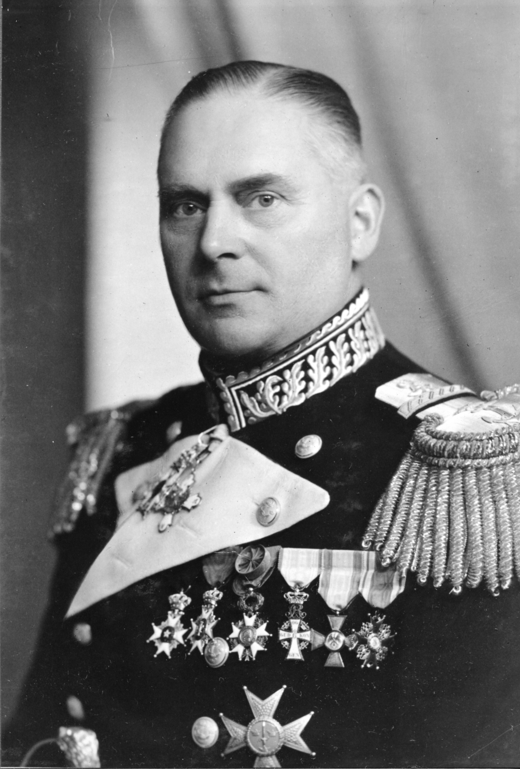 Viceamiral Gunnar Bjurner (1882-1964), chef för Sydkustens marindistrikt 1937 och för Kungl. Marinförvaltningen 1938-1943.